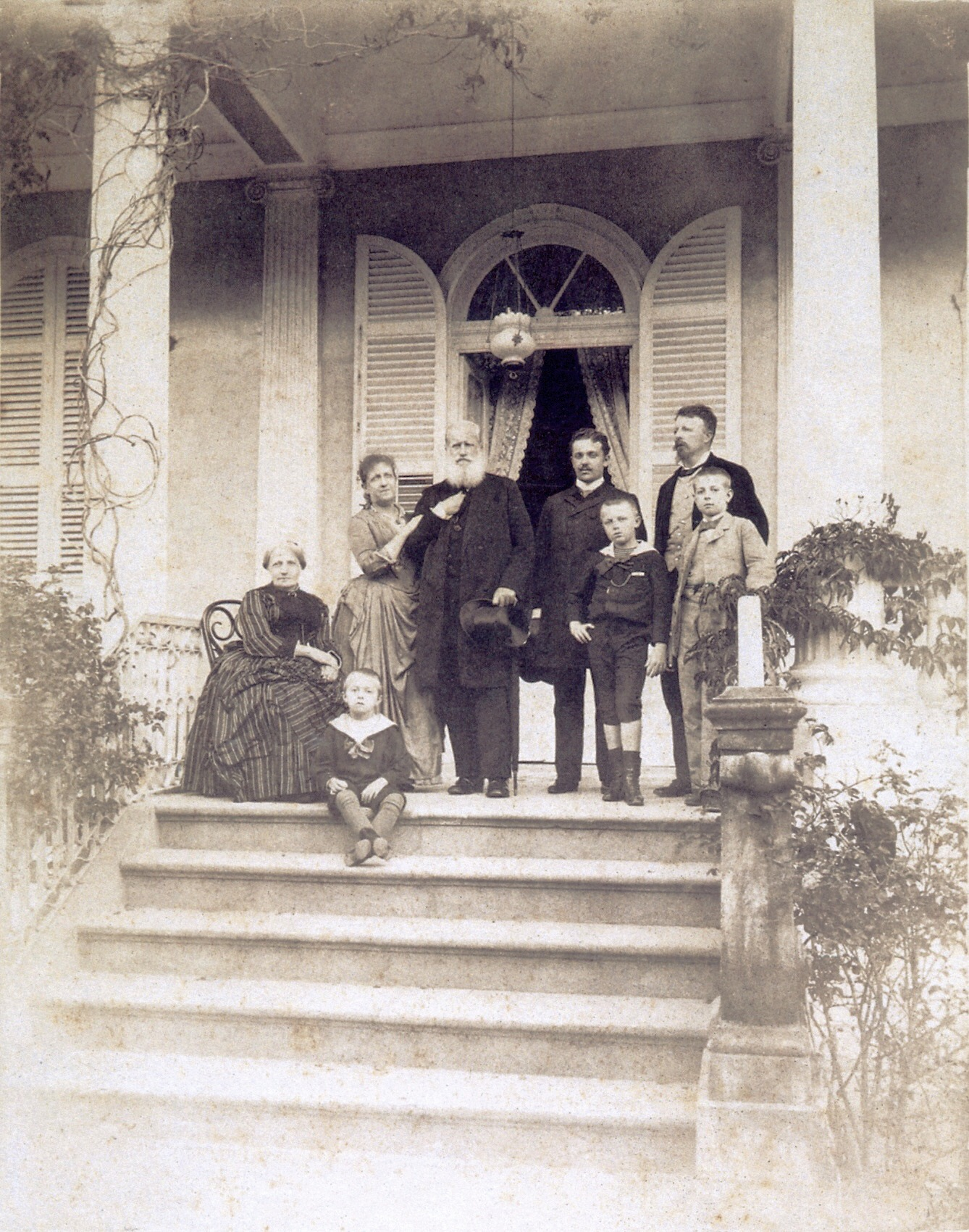 Dom Pedro II, Imperador do Brasil e a família imperial fotografada por Otto Hees.Legenda: Da esquerda para a direita: a imperatriz Dona Teresa Cristina, D. Antônio, a princesa Isabel, o imperador, D. Pedro Augusto (filho da irmã da princesa Isabel, d. Leopoldina, duquesa de Saxe), D. Luís, o conde d'Eu e D. Pedro de Alcântara (príncipe do Grão-Pará).